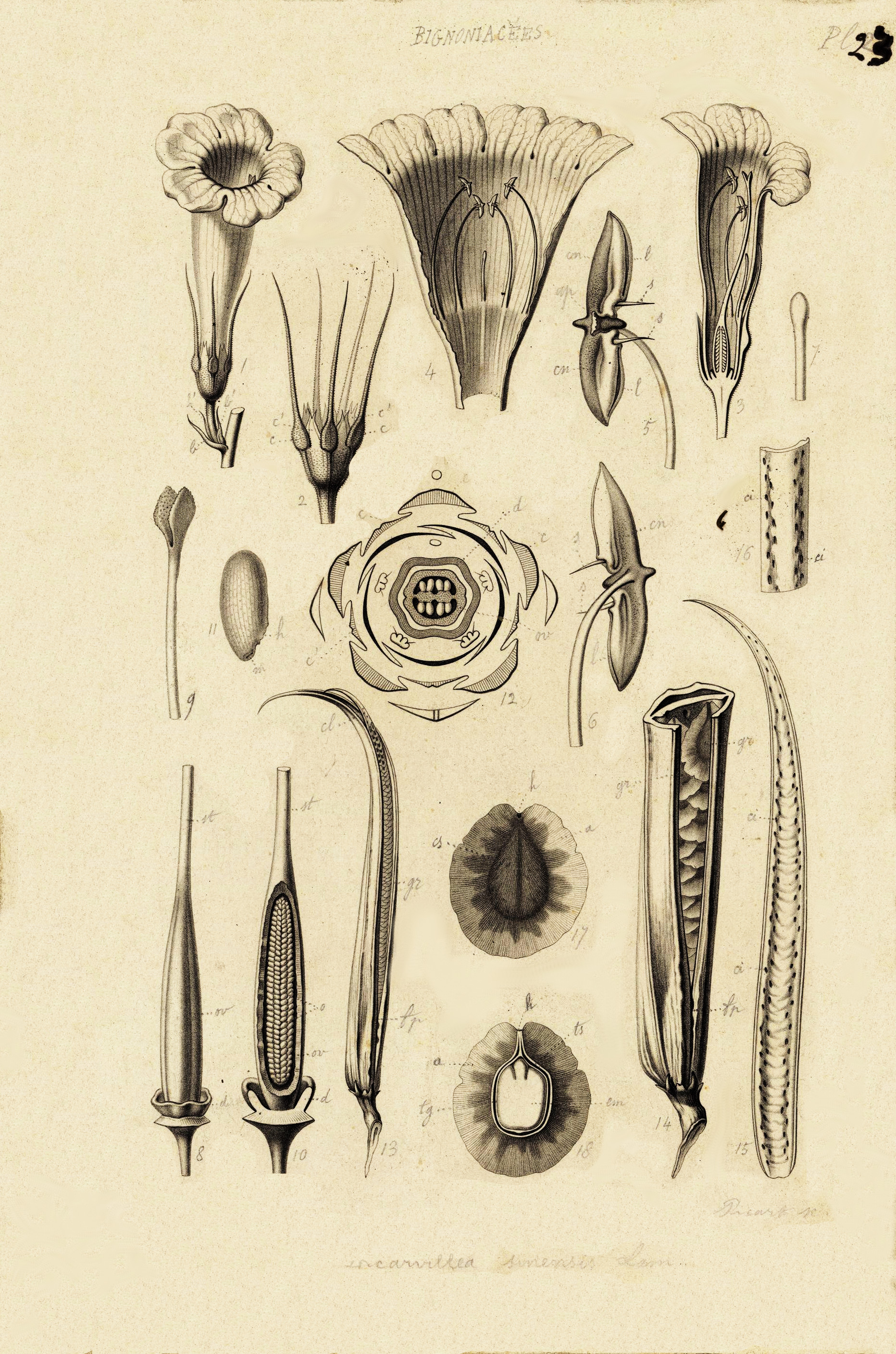 Muséum national d’Histoire naturelle, Paris (France) Collection : Plantes vasculaires (P) Spécimen P03594471